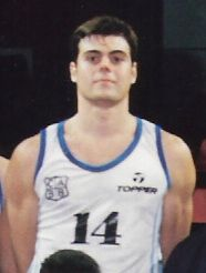 Sub 22 - Año 1993